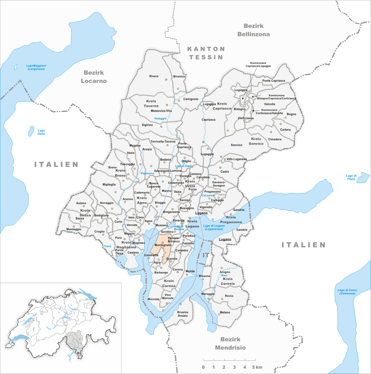 Municipality Montagnola Artist: Tschubby